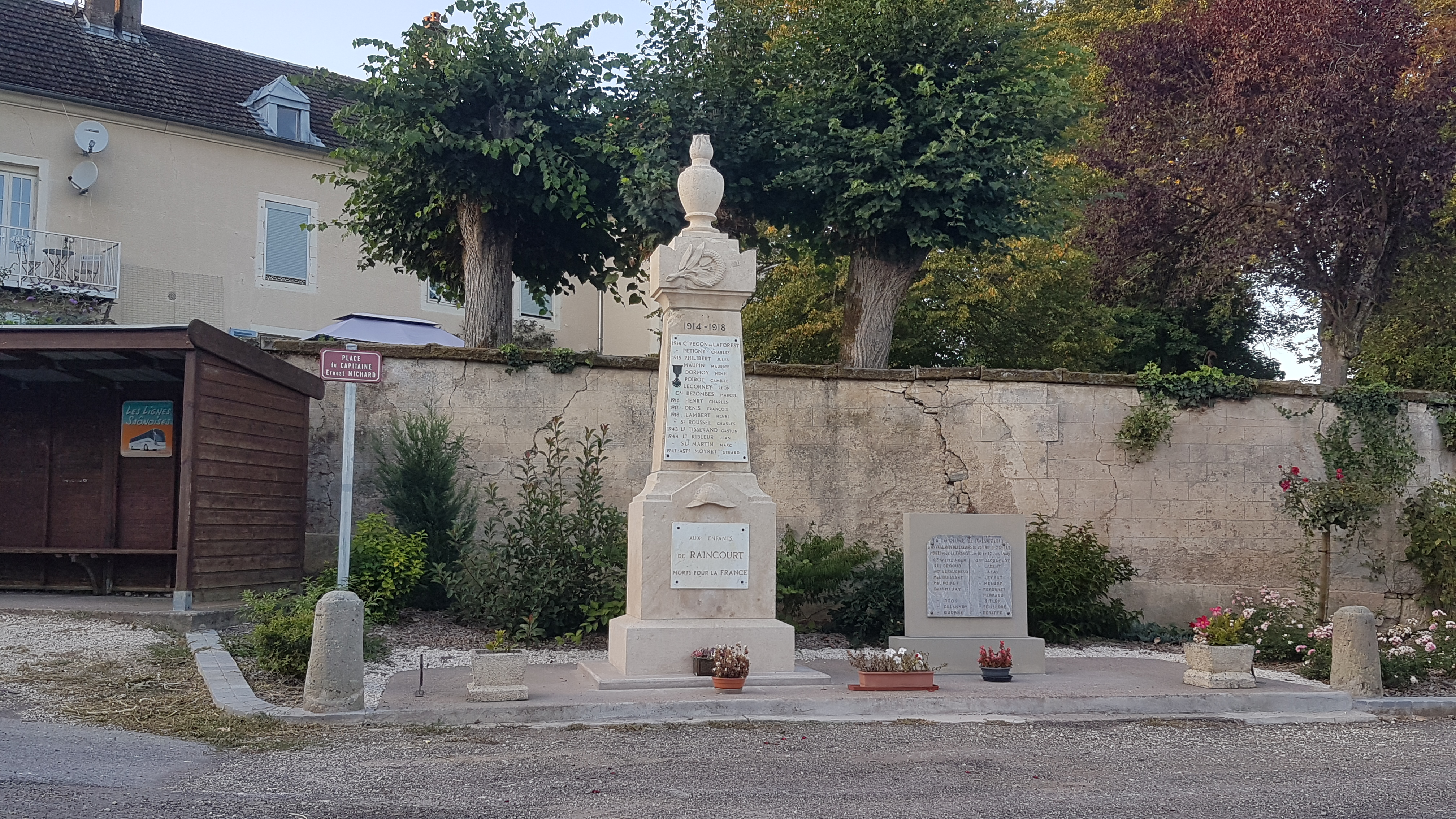 Monument aux morts de Raincourt, après son déplacement inauguré le 11 novembre 2018.